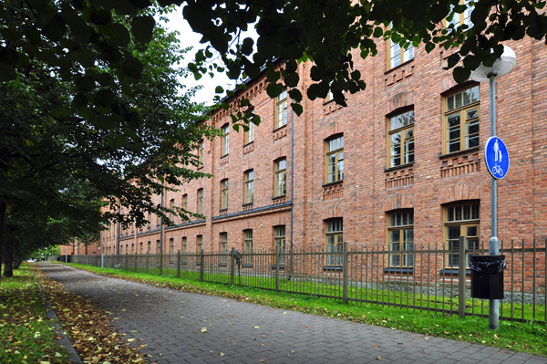 Esikuntarakennus Turuntien varressa